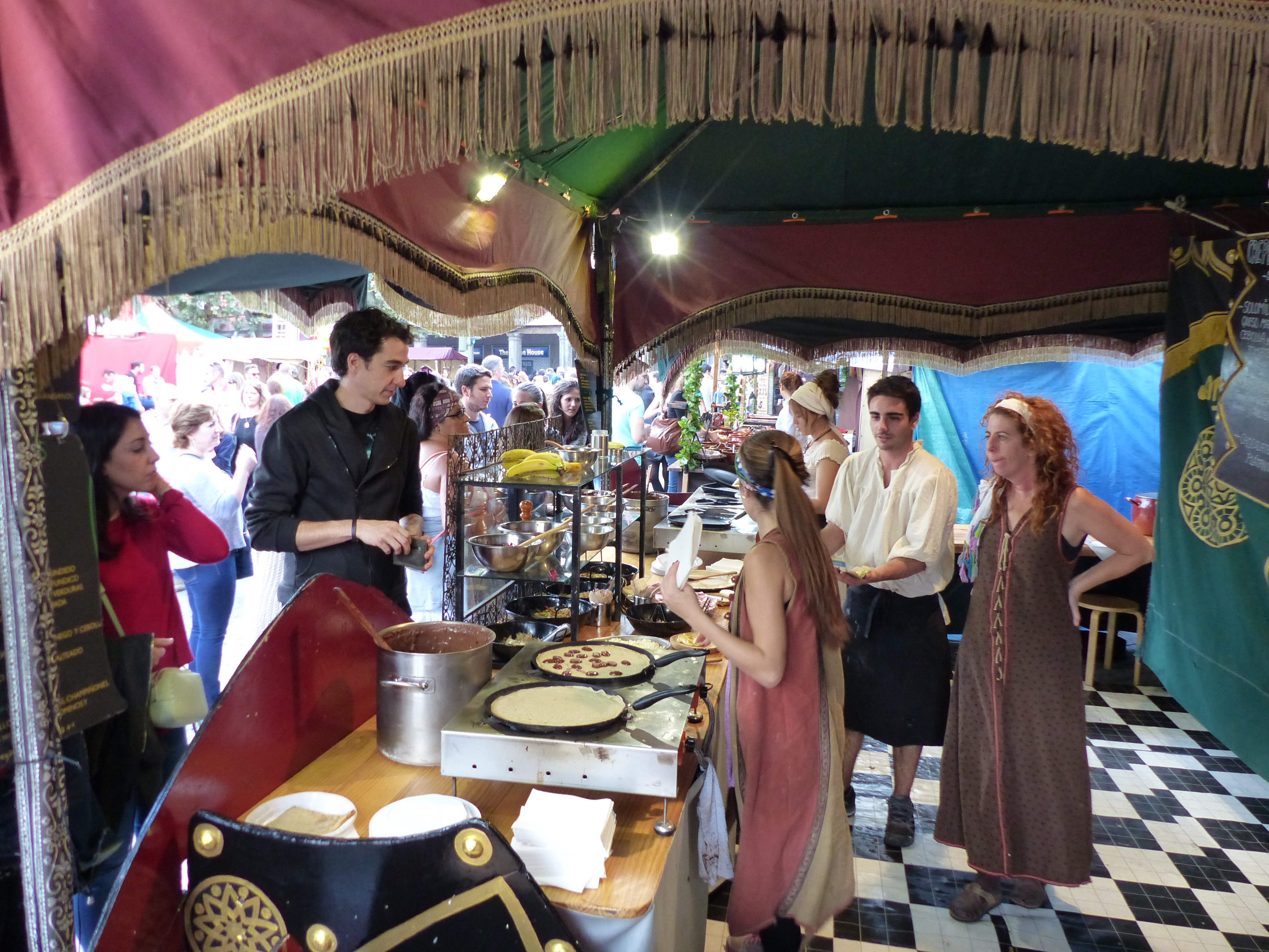 Uno de los puestos del mercado medieval, Alcalá de Henares.